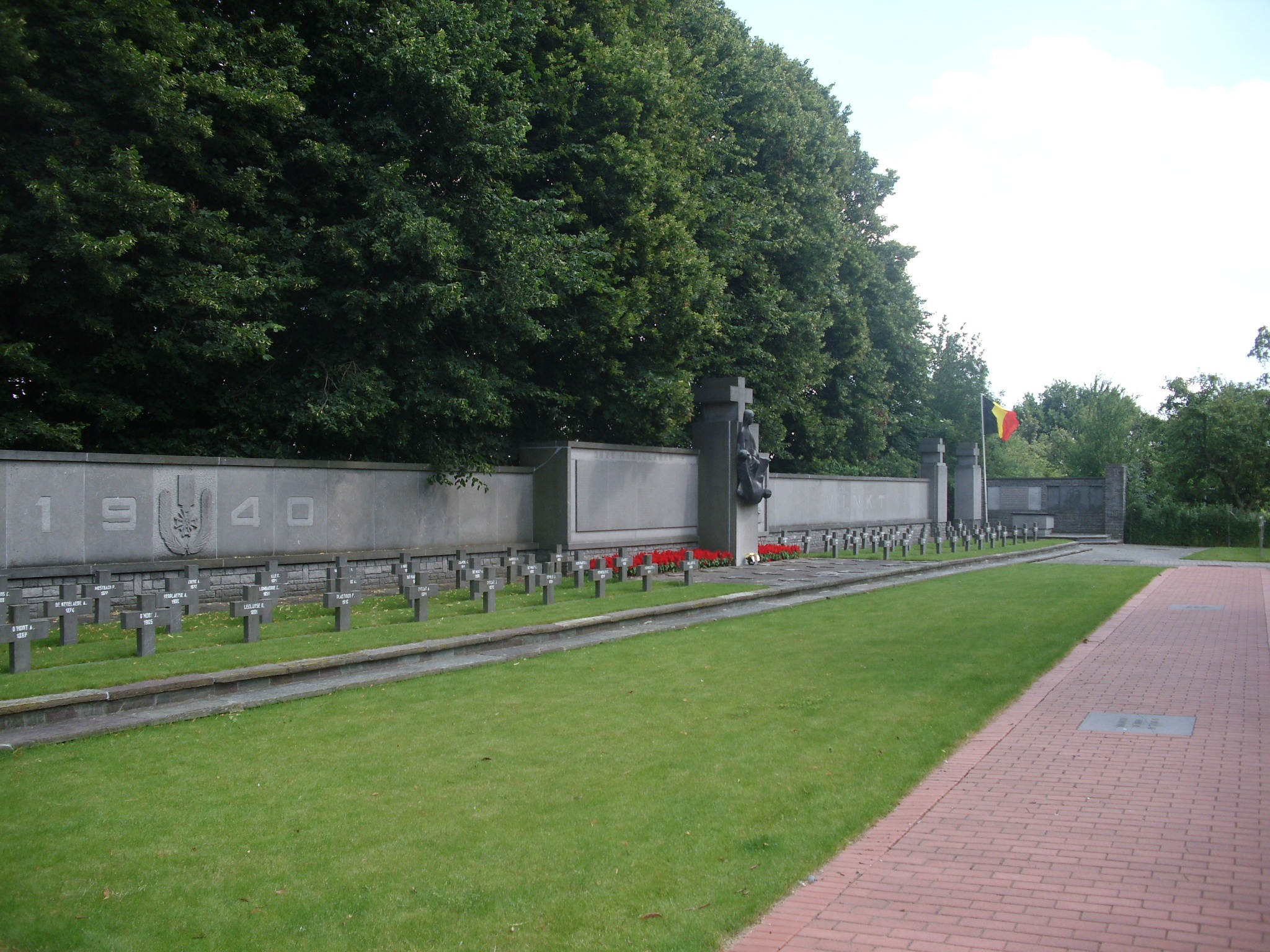 Oorlogsmonument Tweede Wereldoorlog - Martelarenplein - Vinkt - Deinze - Oost-Vlaanderen - België